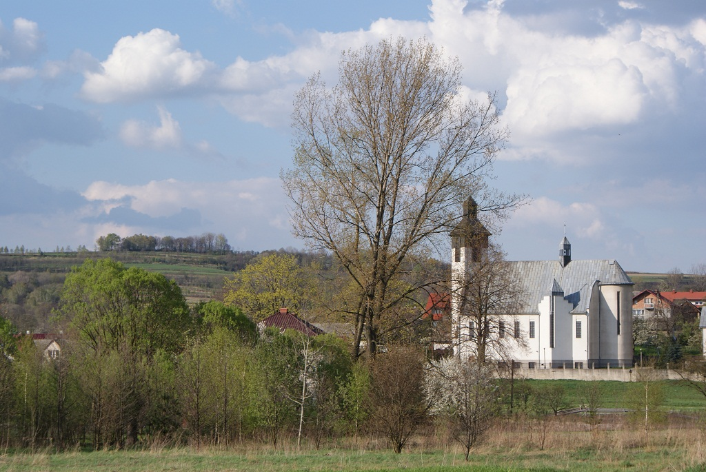 Widok na kościół w Kwaczale